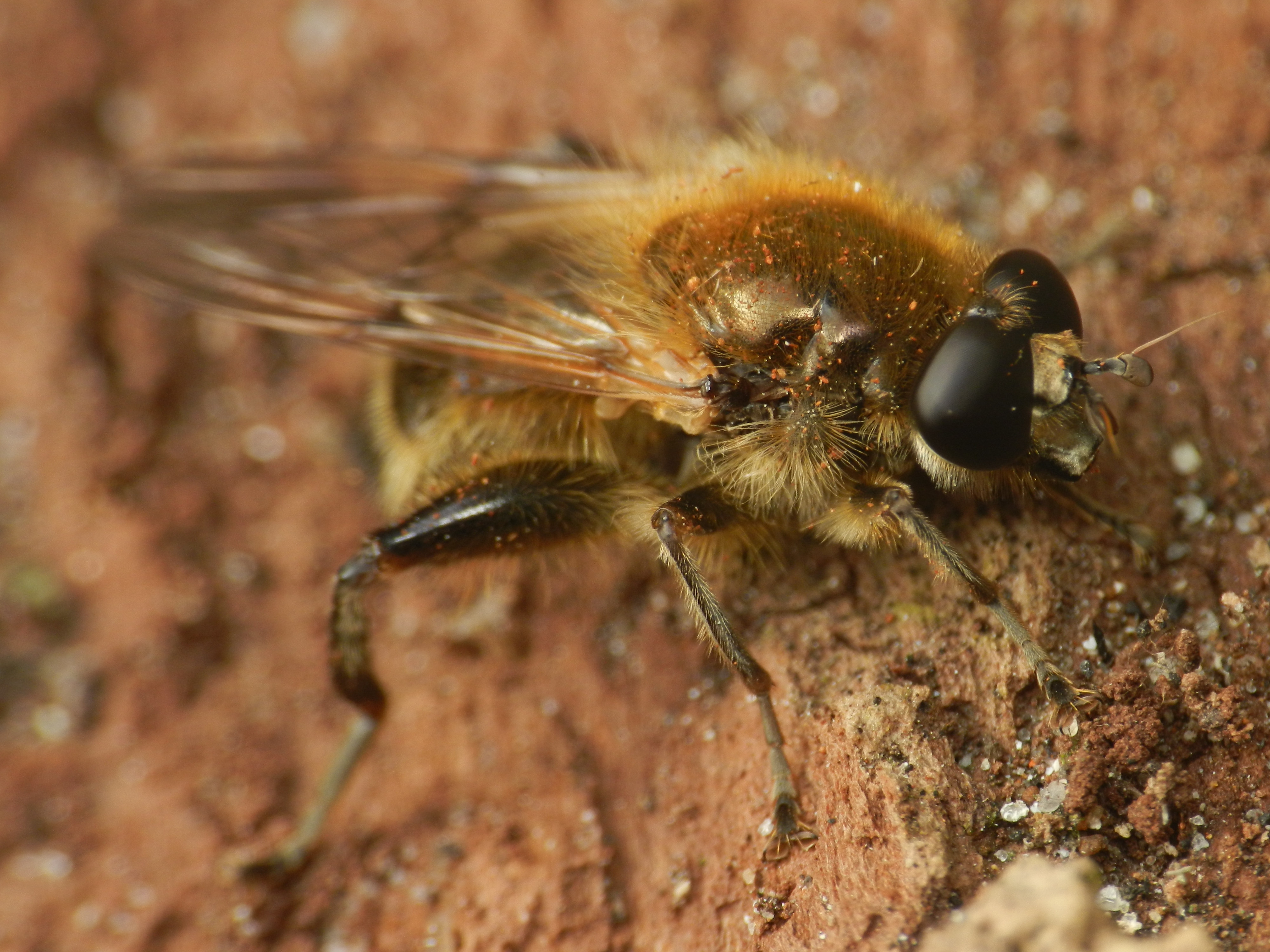 Brachypalpus valgus. Picture taken in Olsztyn, Poland.